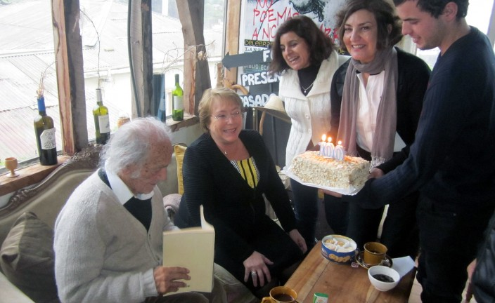 Presidenta Michelle Bachelet visitó a Nicanor Parra por su centenario.